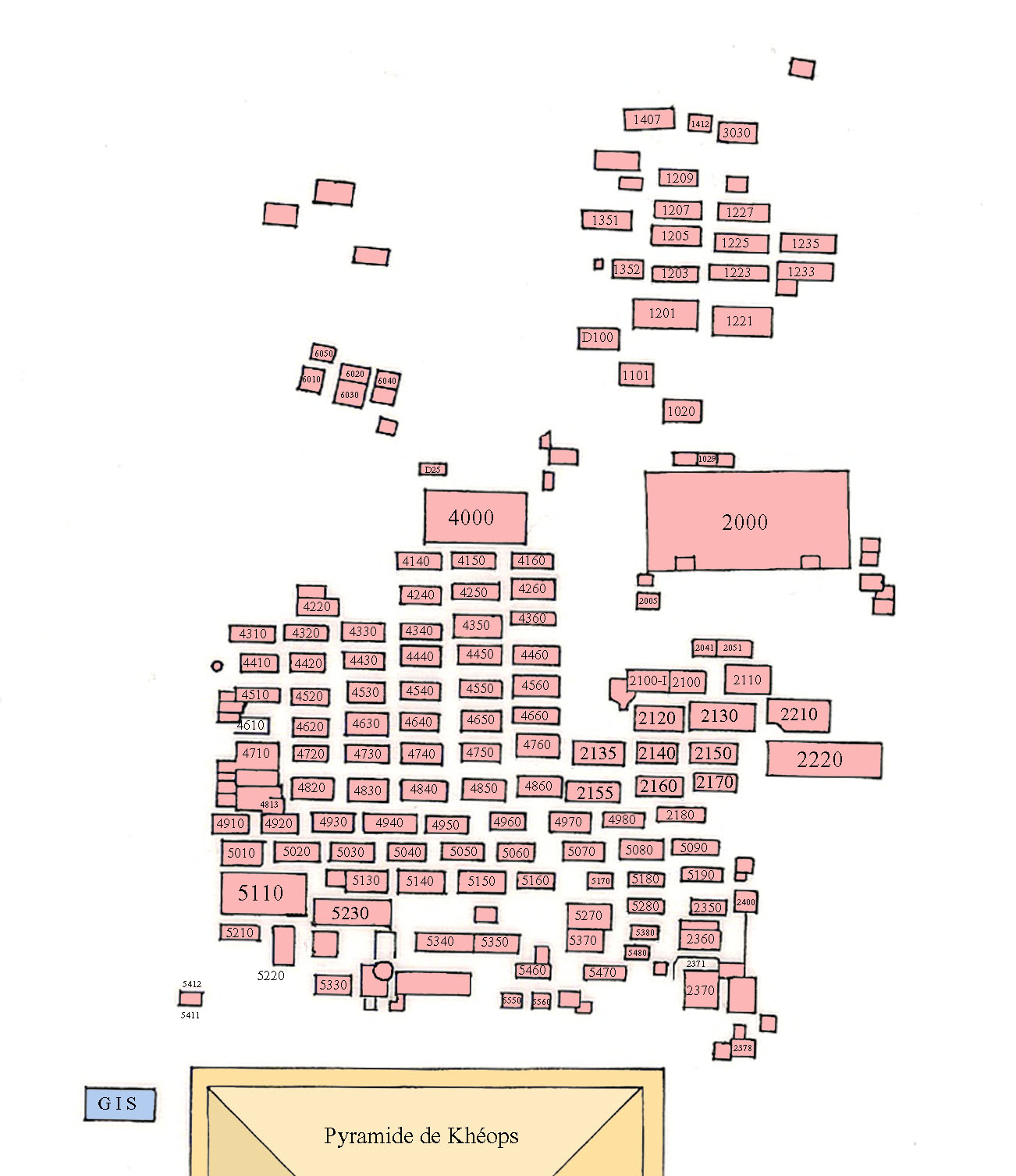 Carte du cimetière ouest de la nécropole de Gizeh